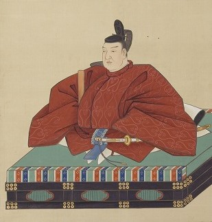 真田信利の肖像。